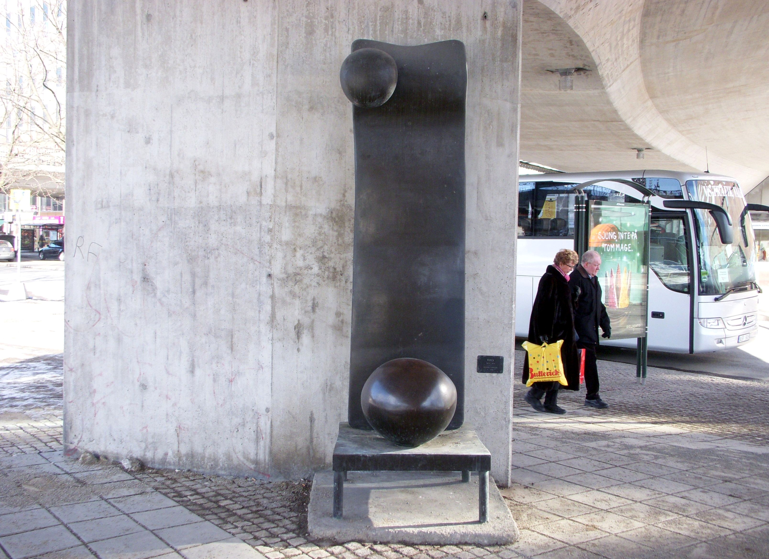 Järnvägsparken i Stockholm: "Parea" av Ingemar Svensson